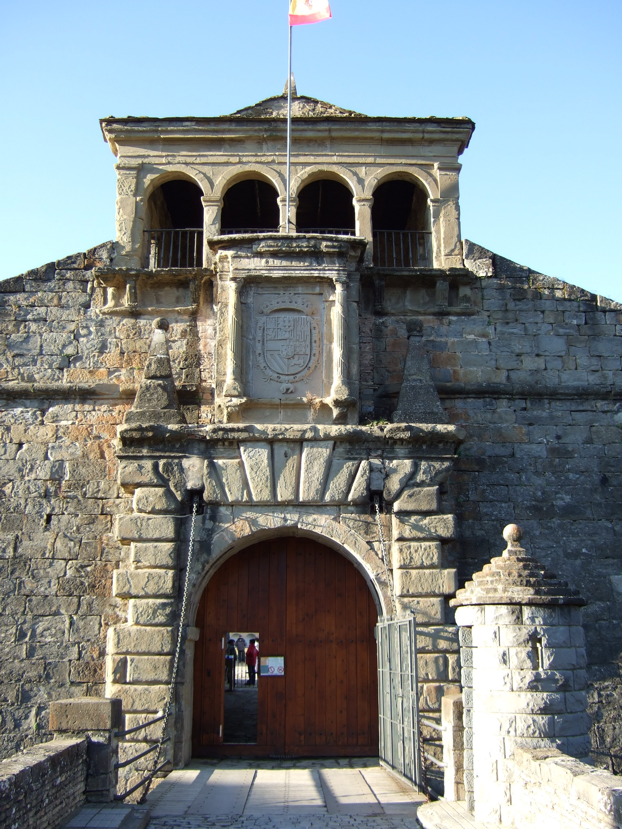 Jaca - Castillo de San Pedro - Portada siglo XVI